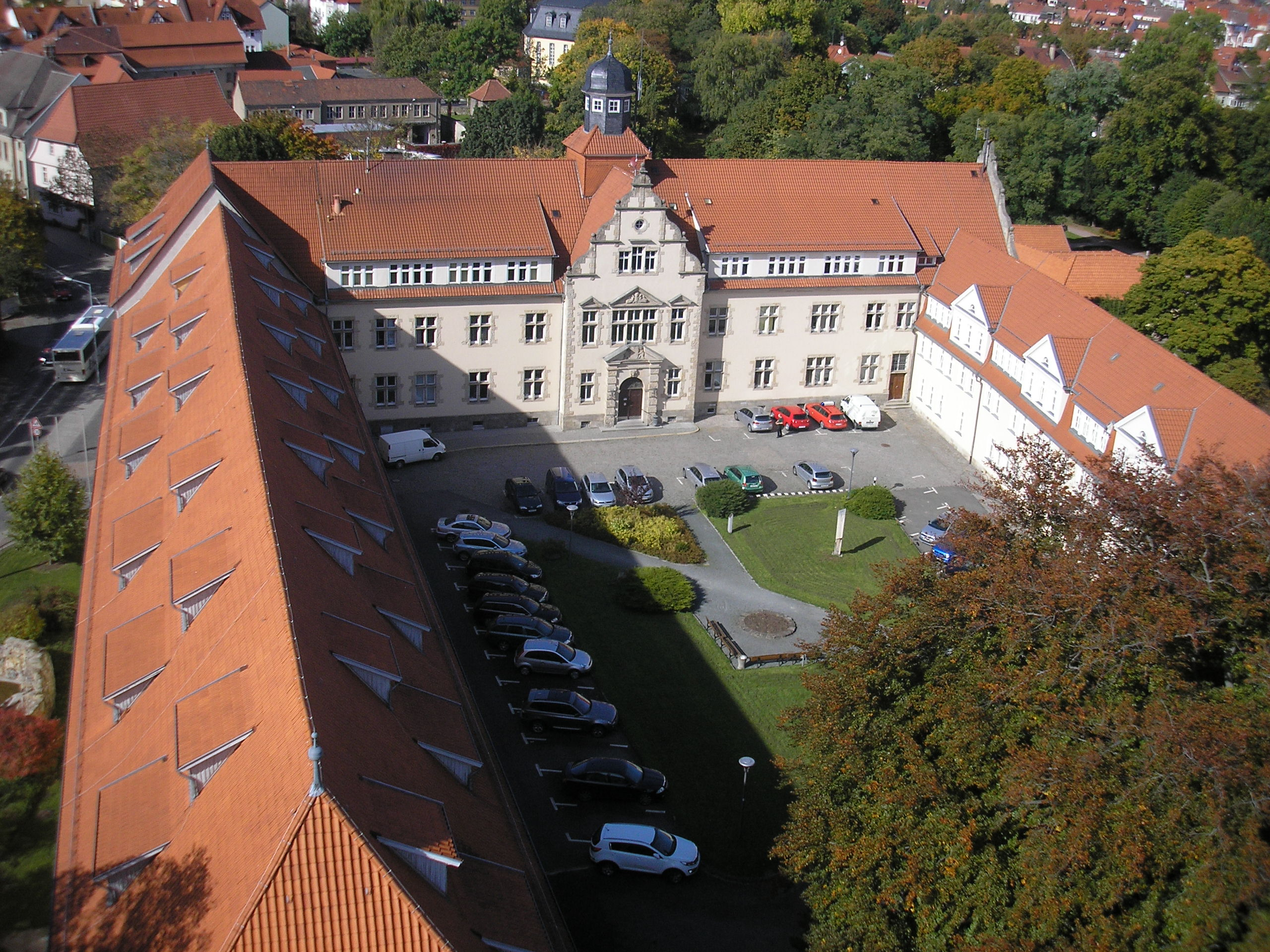 Das Gebäude des Landratsamtes in Arnstadt (Thüringen).